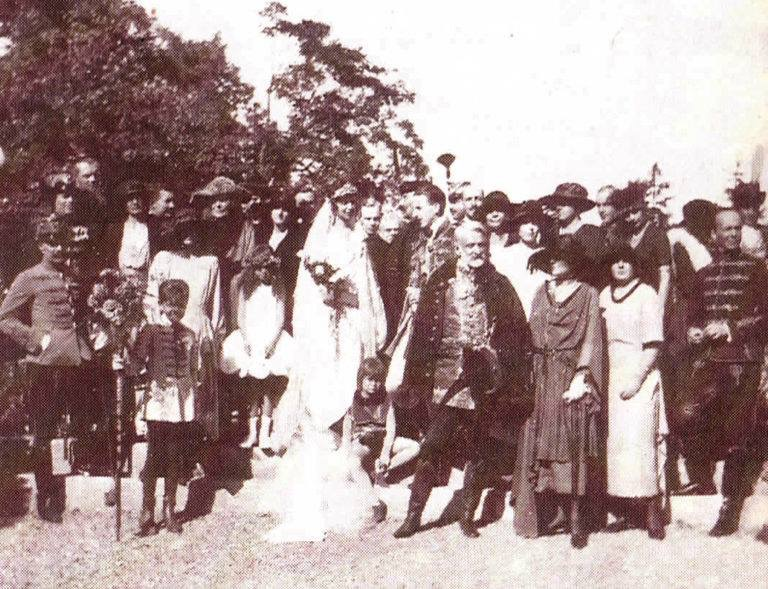 Hochzeitsgesellschaft am 5. September 1921